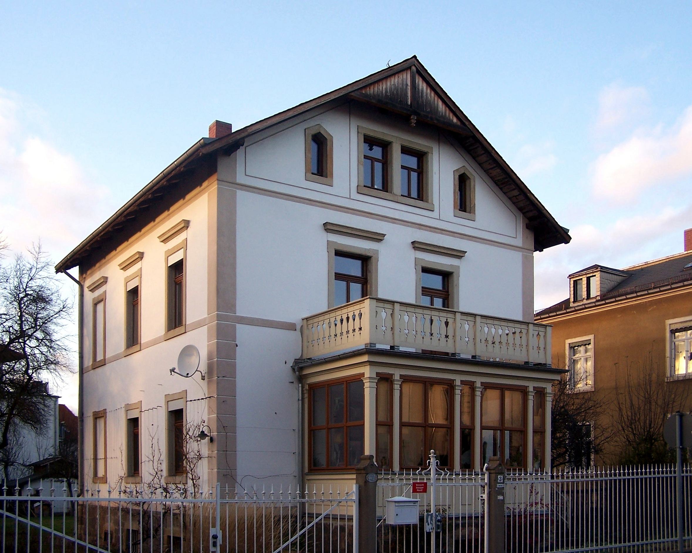 Rosenstr. 3 in Radebeul